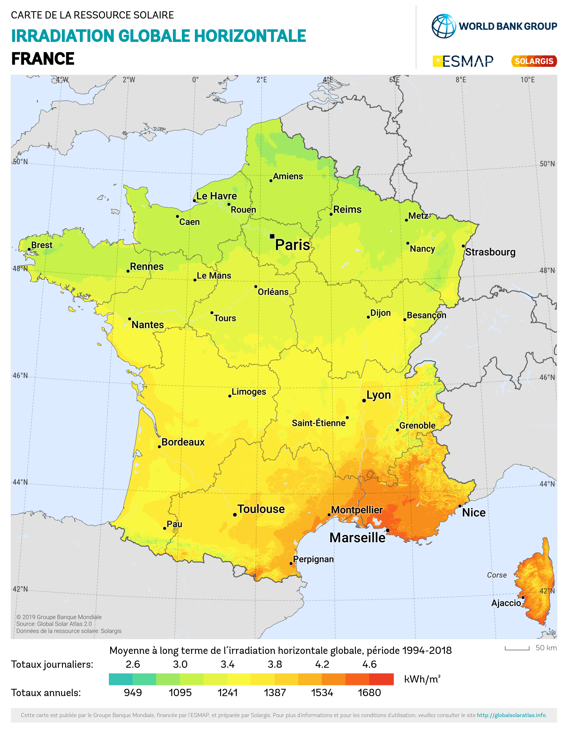 Solar Radiation Map: Irradiation Globale Horizontale en France, SolarGIS 2011